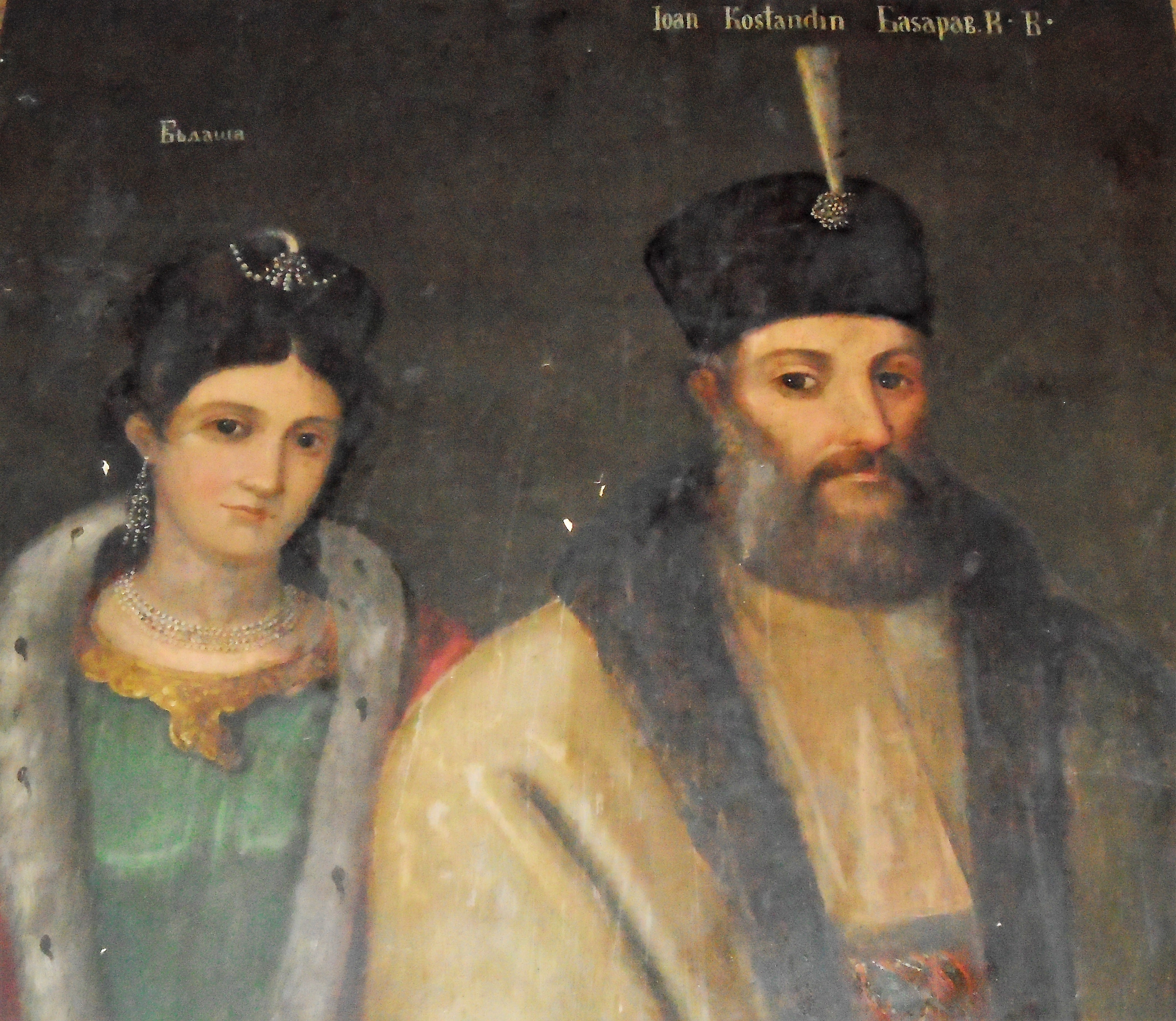 Tablou votiv pictat de Costache Petrescu în 1852.